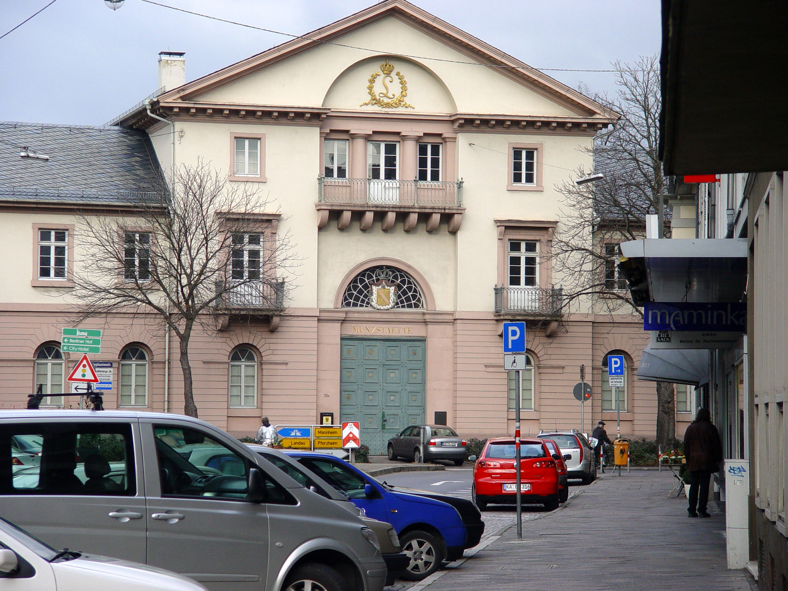 Motiv: Staatliche Münze Karlsruhe